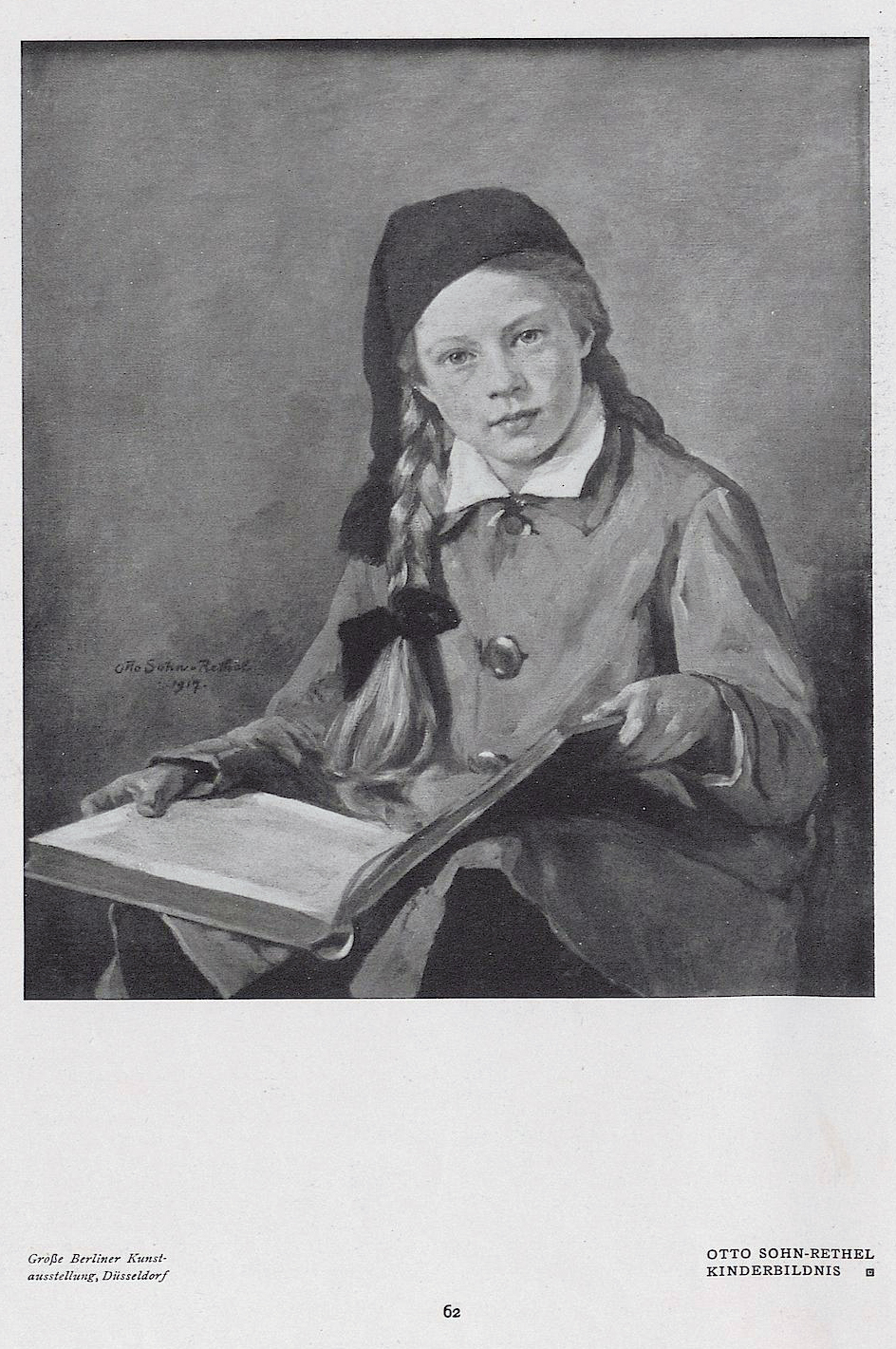 Otto Sohn-Rethel, Kinderbildnis von 1917; Die Düsseldorfer Malerei auf der großen Kunstausstellung 1918 zu Düsseldorf; Die Kunst für Alle, vierunddreißigster Jahrgang, Heft 3/4, November 1918, Seite 62